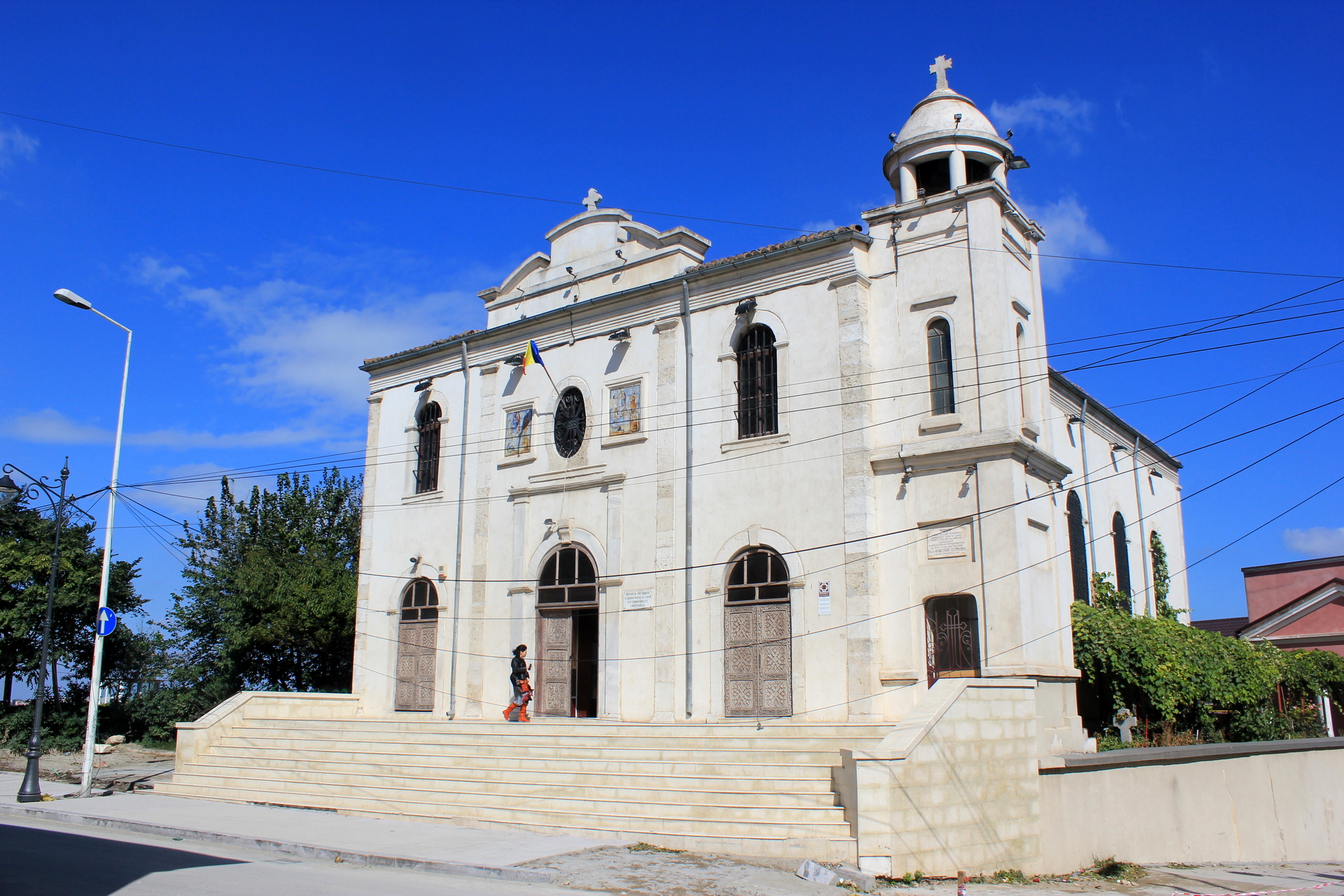 Griechisch-Orthodoxe Kirche in Constanța, Rumänien.